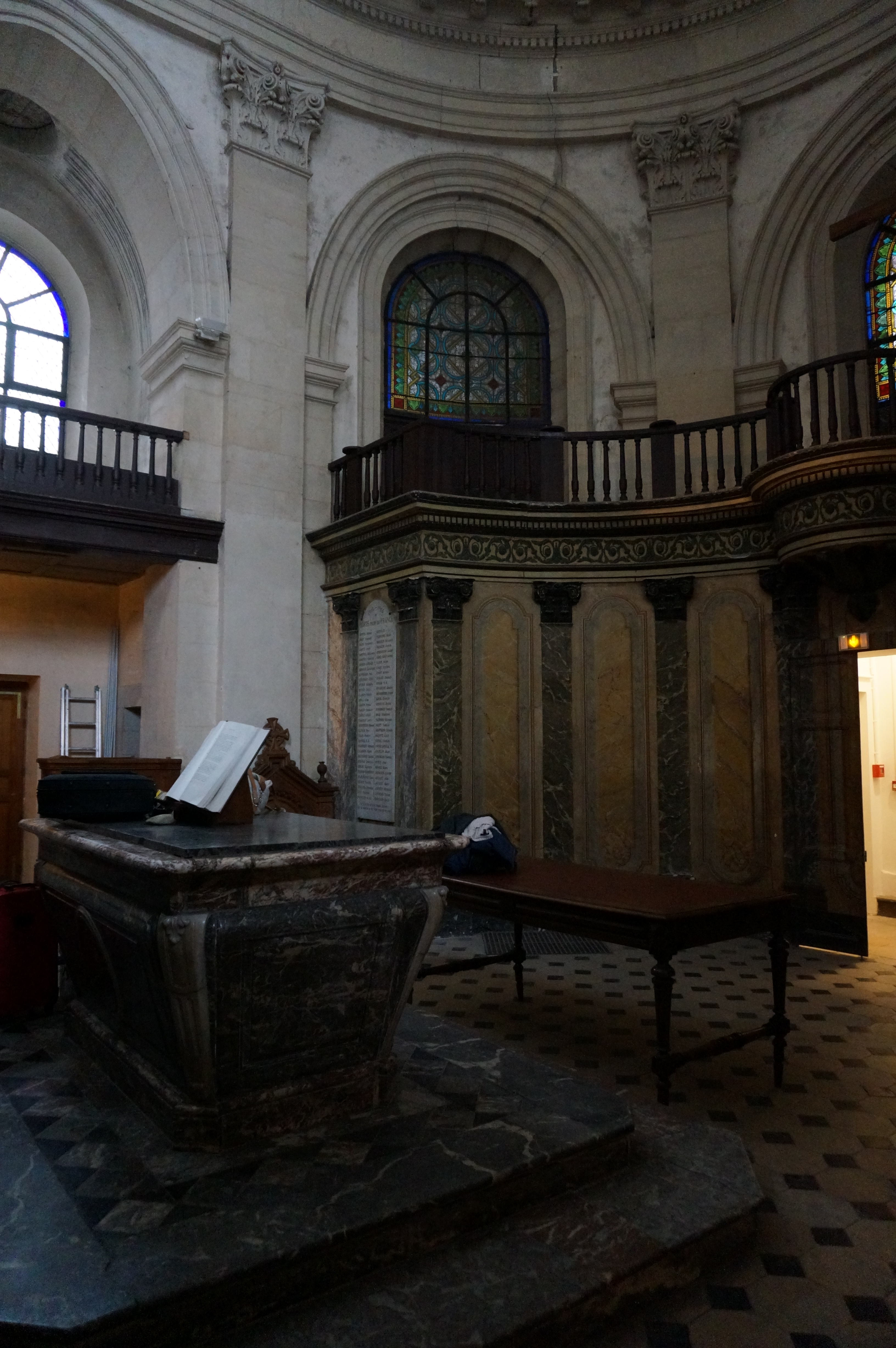 intérieur du Temple protestant de Nancy.